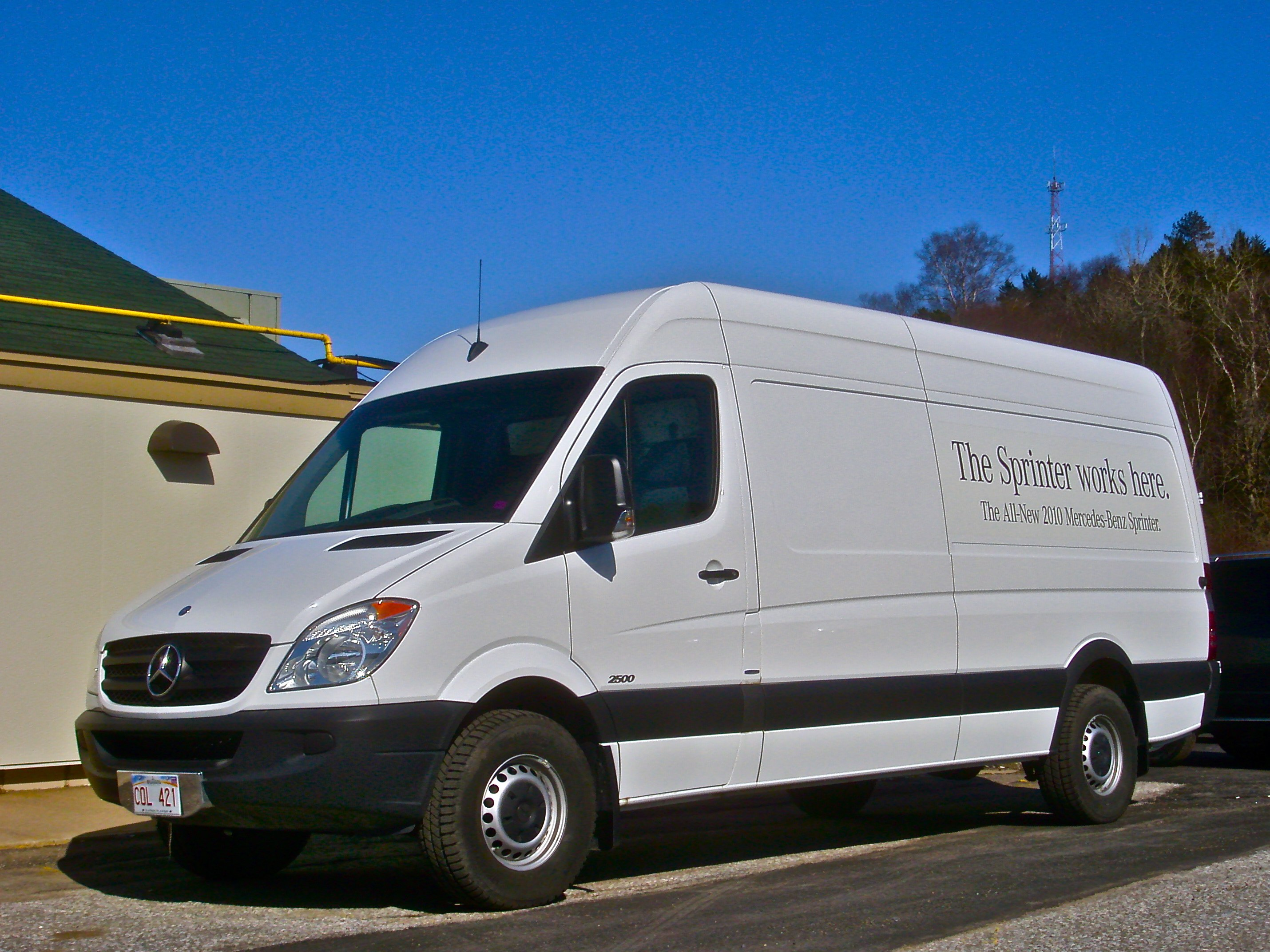 2010 Mercedes-Benz Sprinter 2500 Cargo Van (W906).